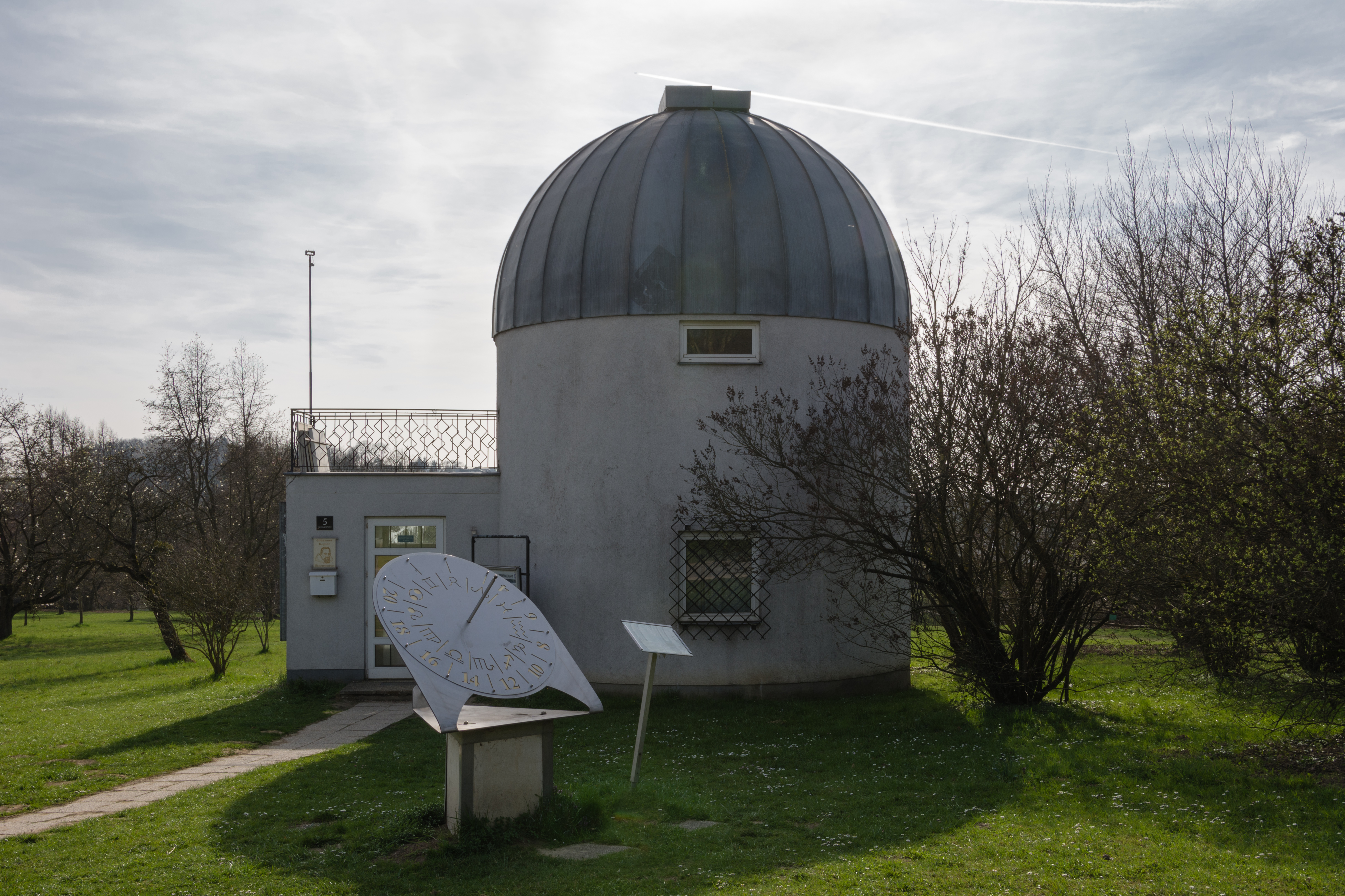 Die äquatoriale Sonnenuhr neben der Kepler-Sternwarte in Linz